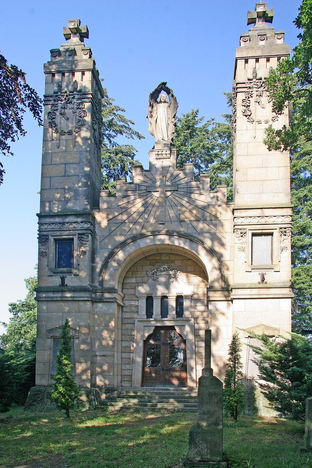 Mauzoleum Kbelnice, district Jičín autor:Prazak date: 6. 7. 2006